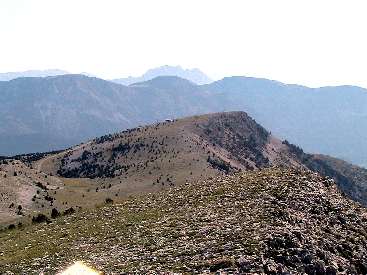 El cap dels Orriets des del Puig de les Morreres, amb la Serra del Verd i el Pedraforca al fons. Port del Comte (Solsonès - Catalunya)